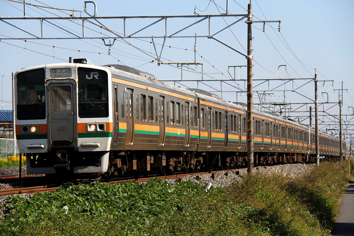 東北線で運行されていた211系10両編成（5両編成+5両編成）